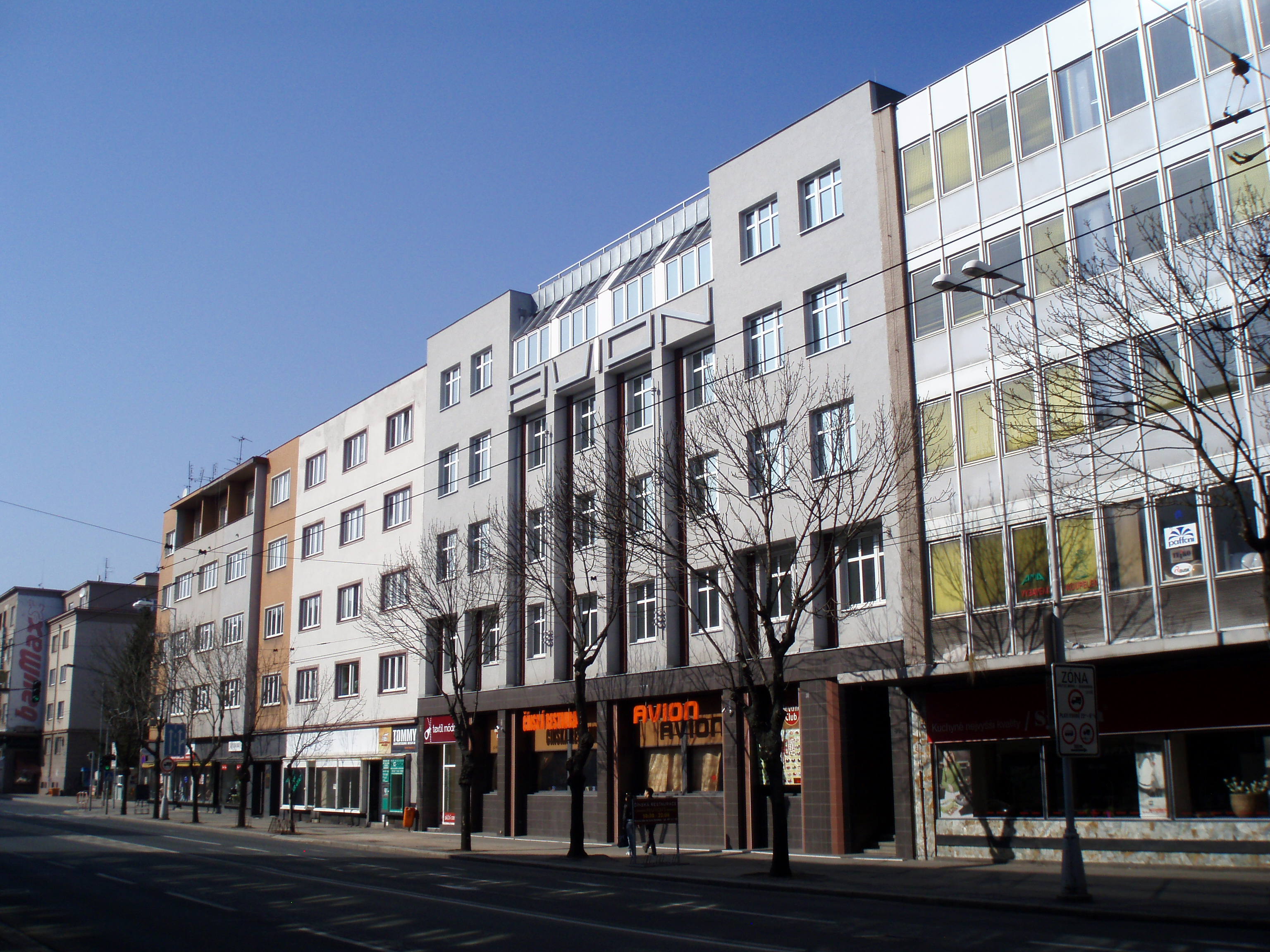 Hotel Avion, Gočárova třída 806/32, Hradec Králové.